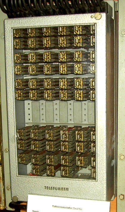 Wählsternschalter 53a Es ist das Gegenstück zur Wählsternübertragung 53 gefunden im Museum De olln Handwarkers ut Worphusen un annere Dörper e.V.